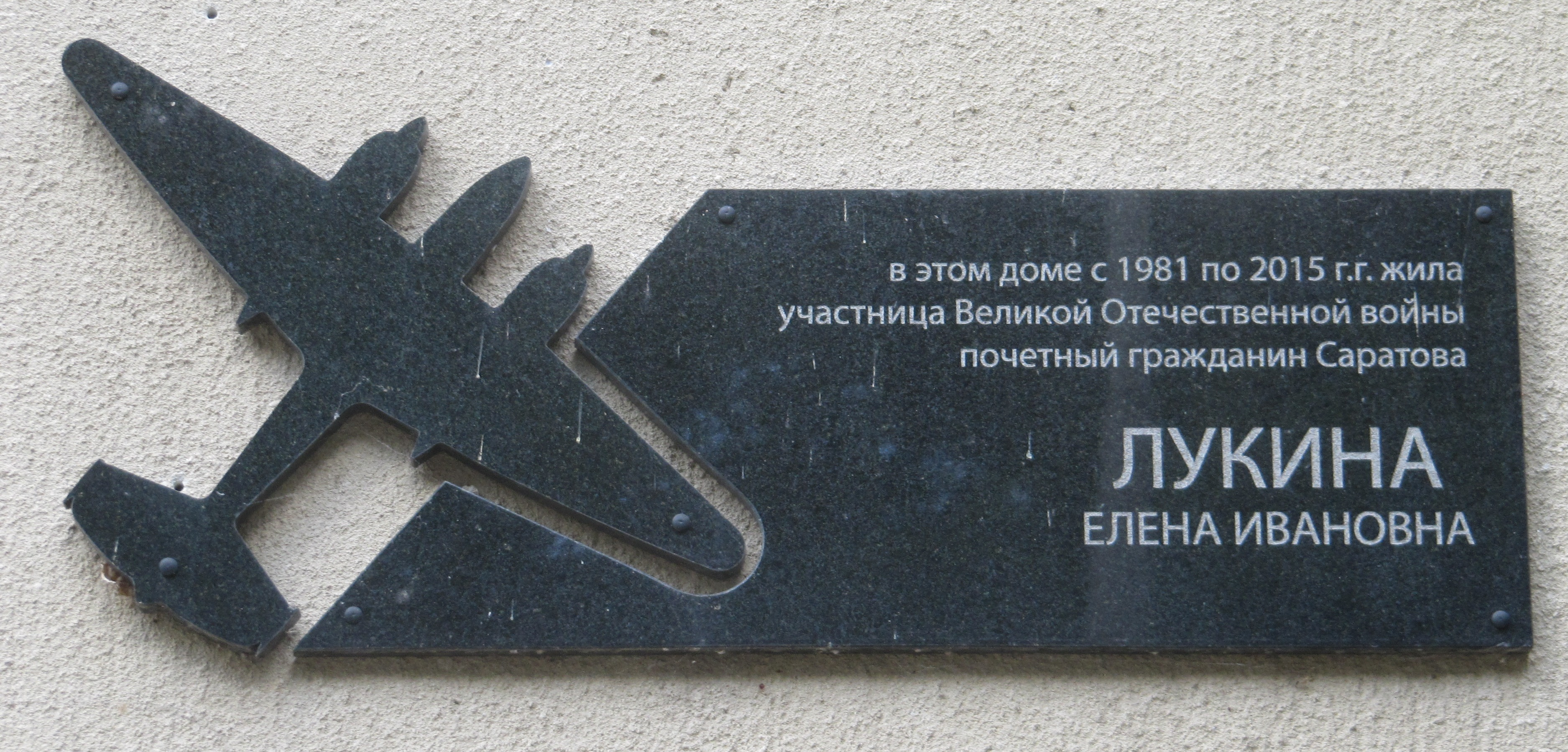 Лукина Елена Ивановна — мемориальная доска, Набережная Космонавтов дом 1А, Саратов.